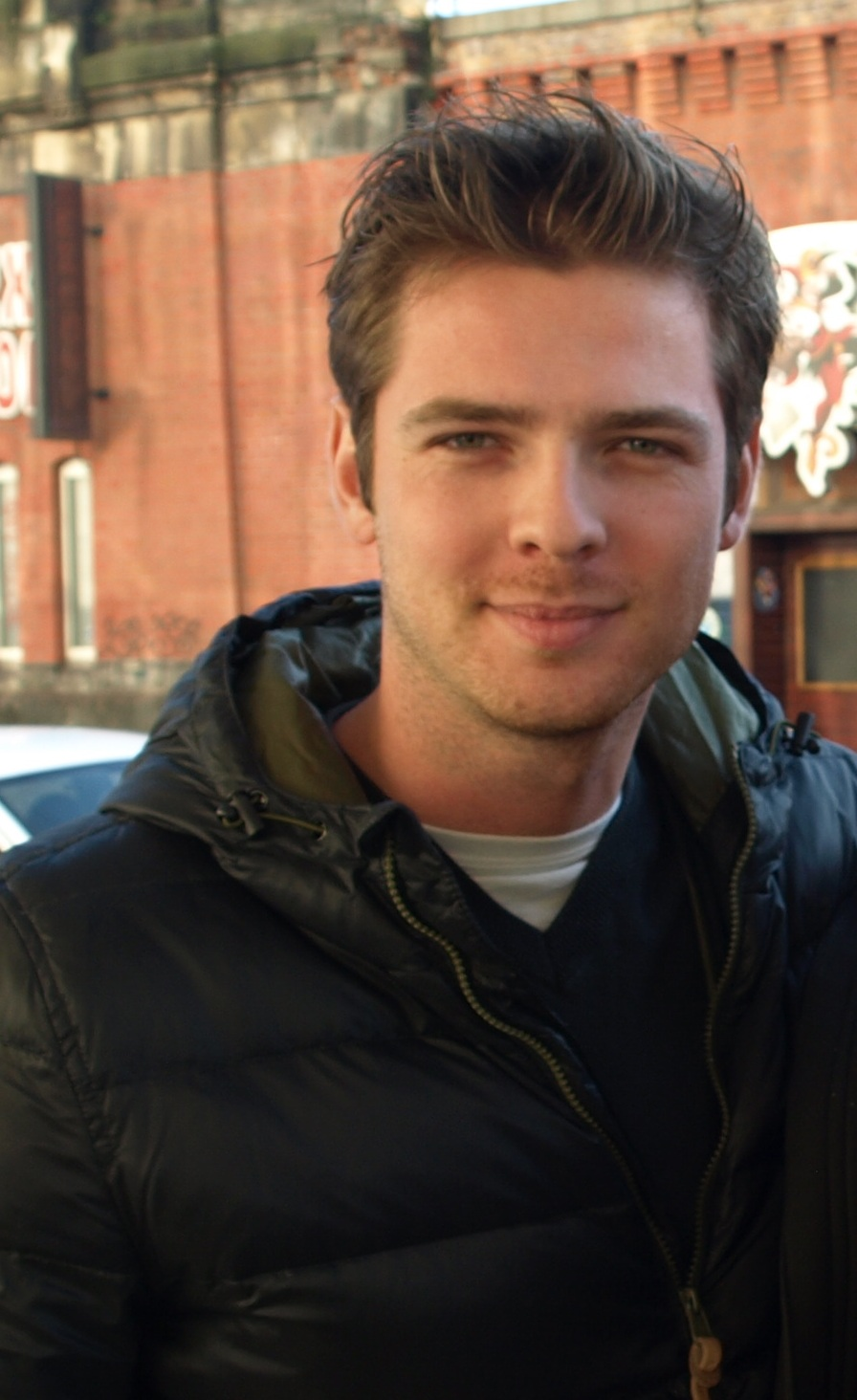 Kamil Kula, aktor.